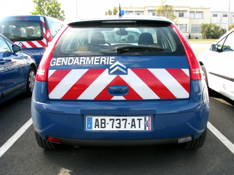 Une Citroën C4 de la Gendarmerie nationale en France avec la nouvelle immatriculation.